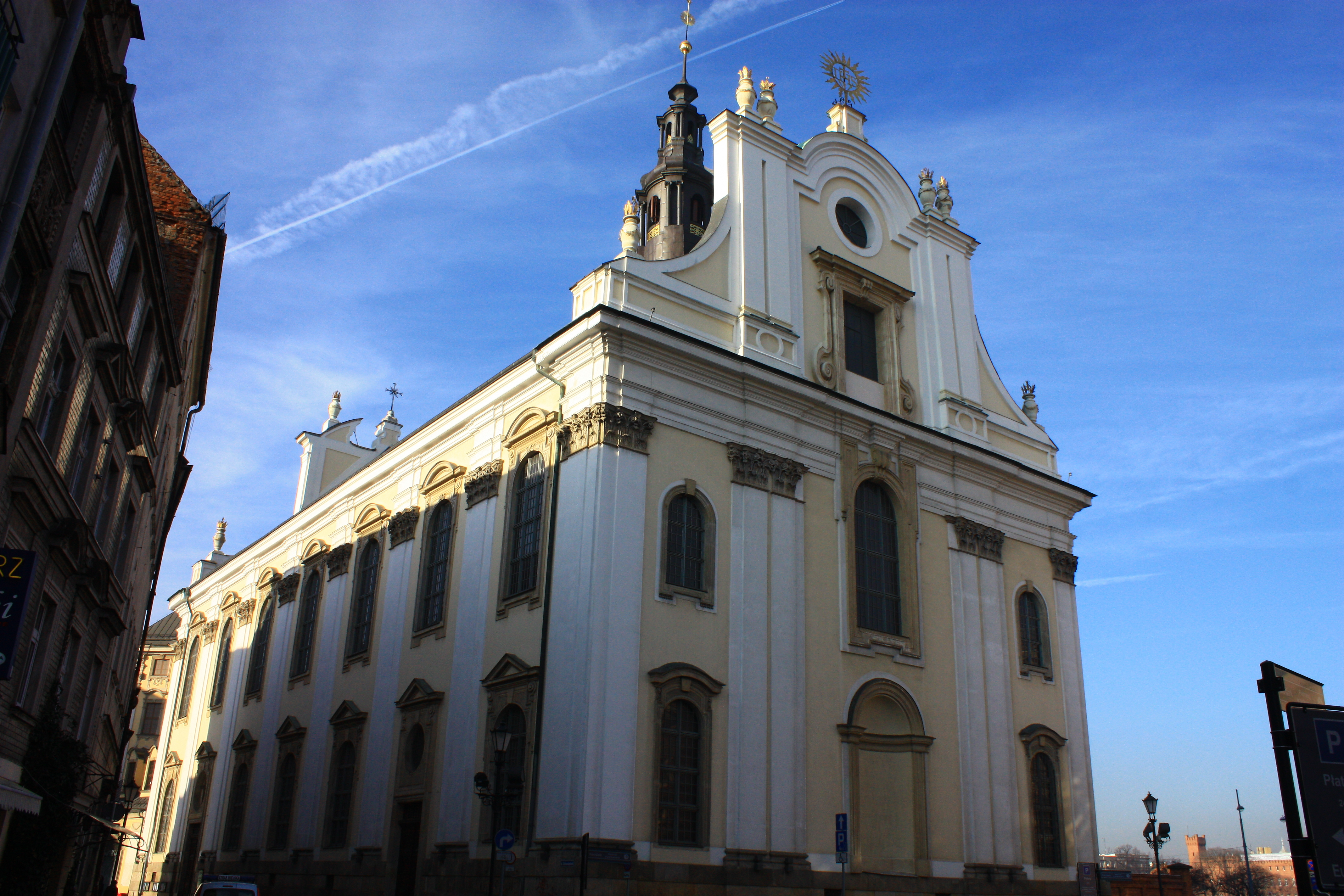 Wrocław, kościół klasztorny jezuitów p.w. Najświętszego Imienia Jezus, 1689-1698, 1722-1734